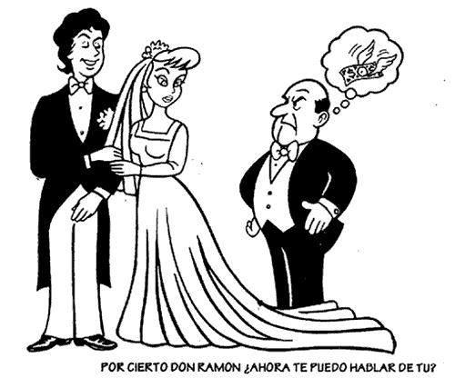 Libro complejo de ratón - Casos fortuitos